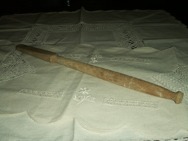 Cannella di legno di nocciolo per rimestare la polenta